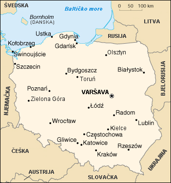 Ovu sam sliku napravio na temelju CIA-ine slike u javnom vlasniÅ¡tvu. --Zmaj 16:36, 1. lipanj 2007. (CEST)